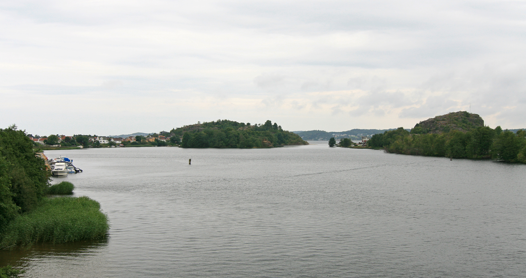 Numedalslågen. Outlet at Larvik. Østre Halsen village in background.